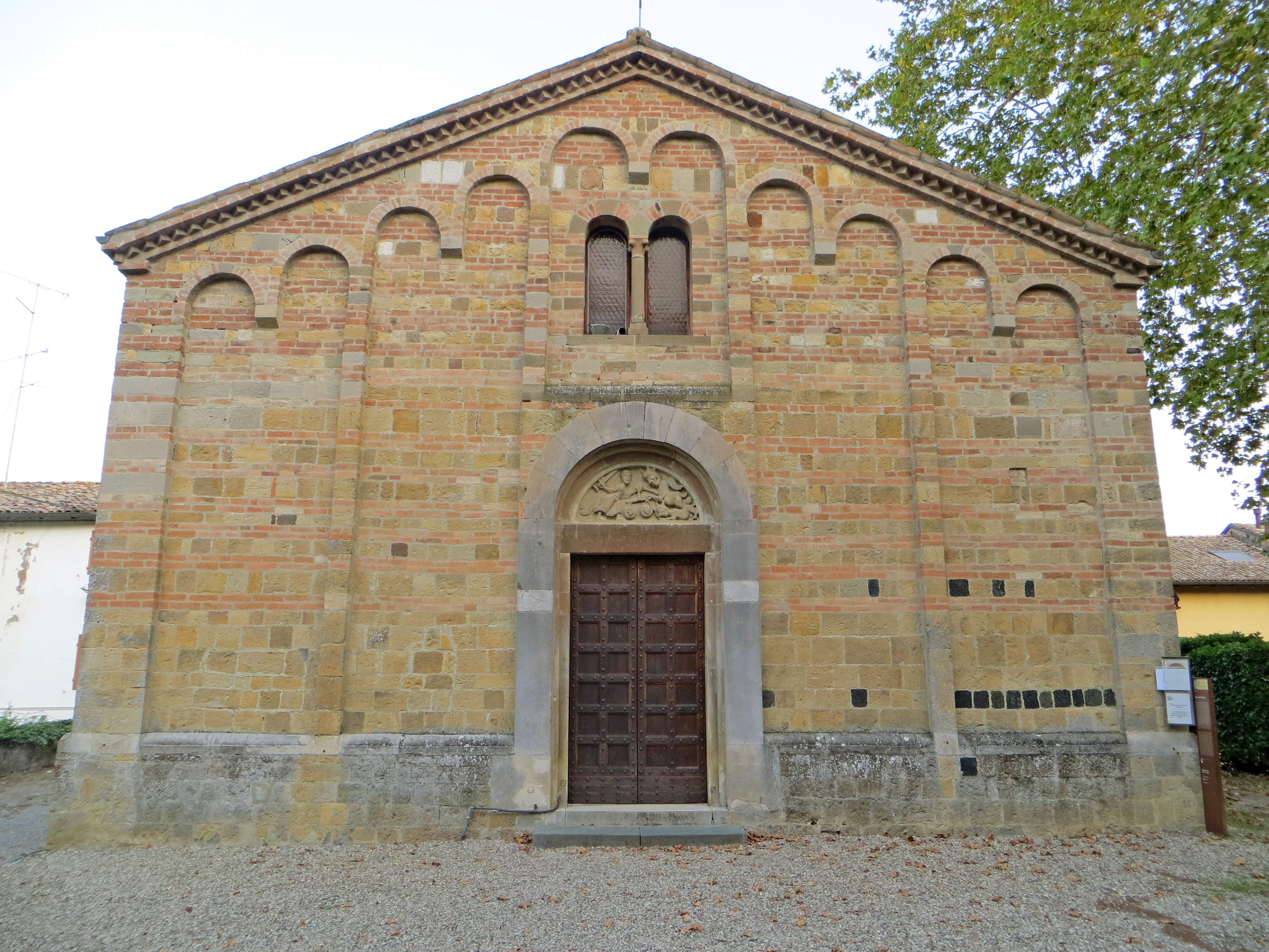 Facciata della pieve di San Biagio This is a photo of a monument which is part of cultural heritage of Italy.